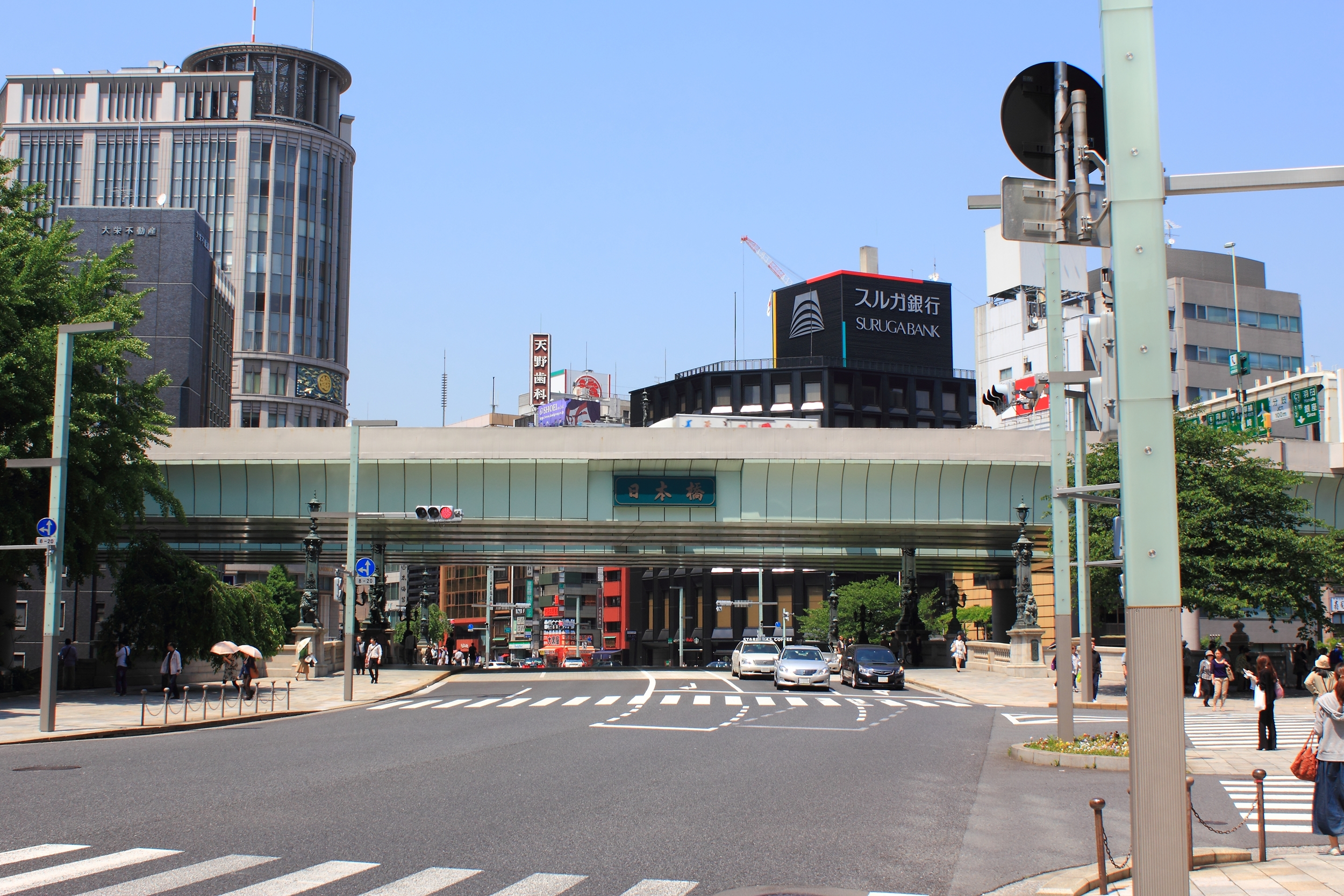 日本橋（東京都中央区）